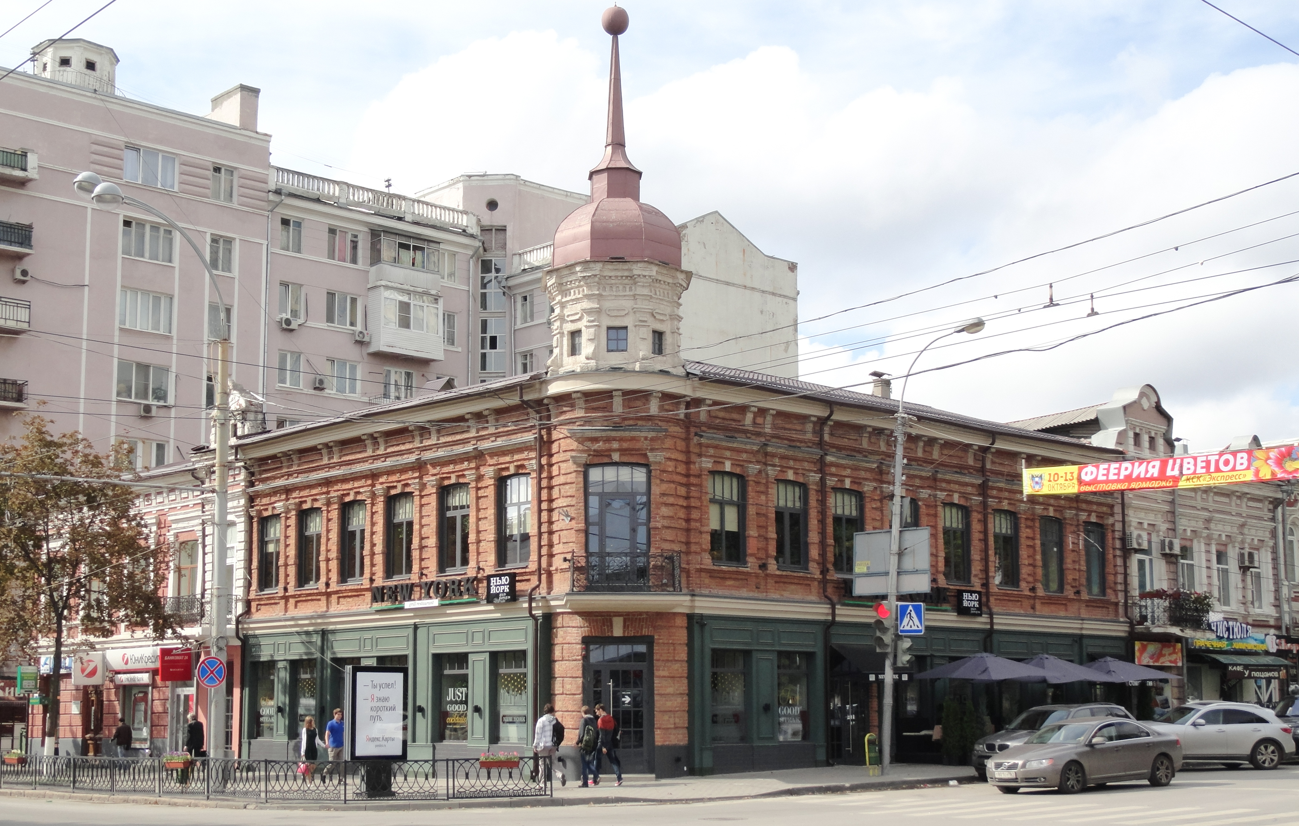 Здание доходного дома Масалитиной (Ростовская область, Ростов-на-Дону, улица Большая Садовая, 113)